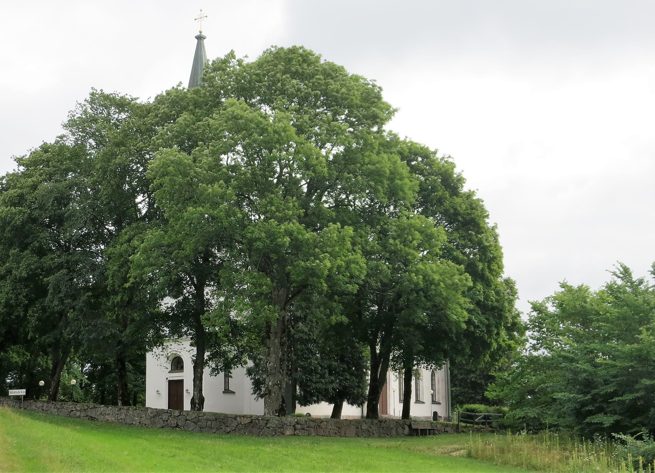 Båraryds kyrka, Växjö stift i Småland